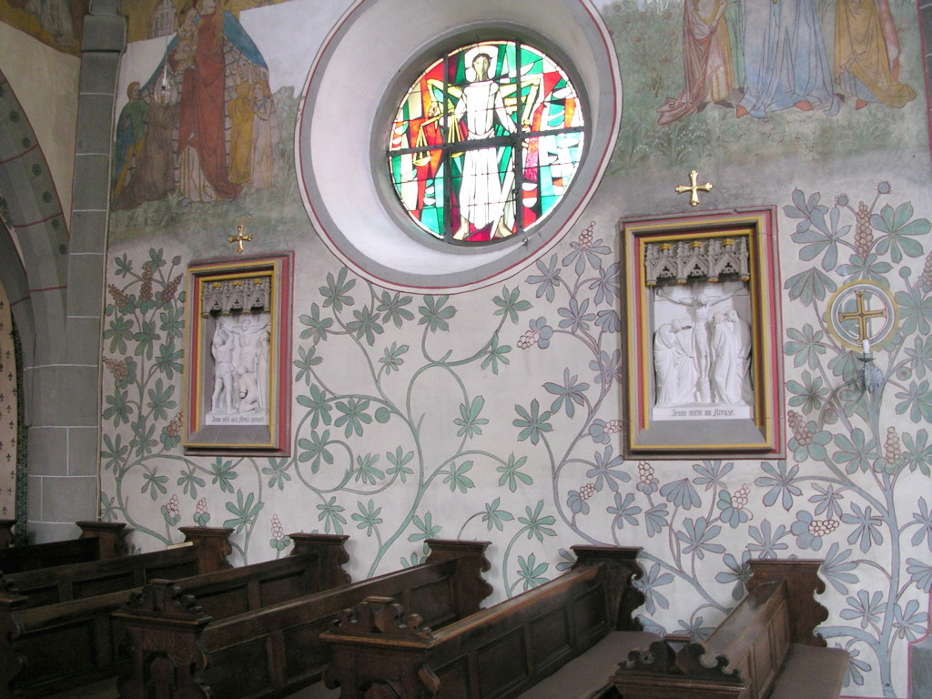 Ahrweiler, katholische Pfarrkirche St. Laurentius, Blumenrankenfresko, Kreuzwegstationen 11 und 12, Szenen und ein Fenster